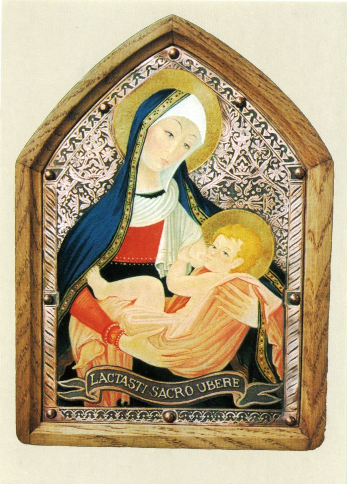 абраз Маці Божай Карміліцы (Lactasti Sacro Ubere)